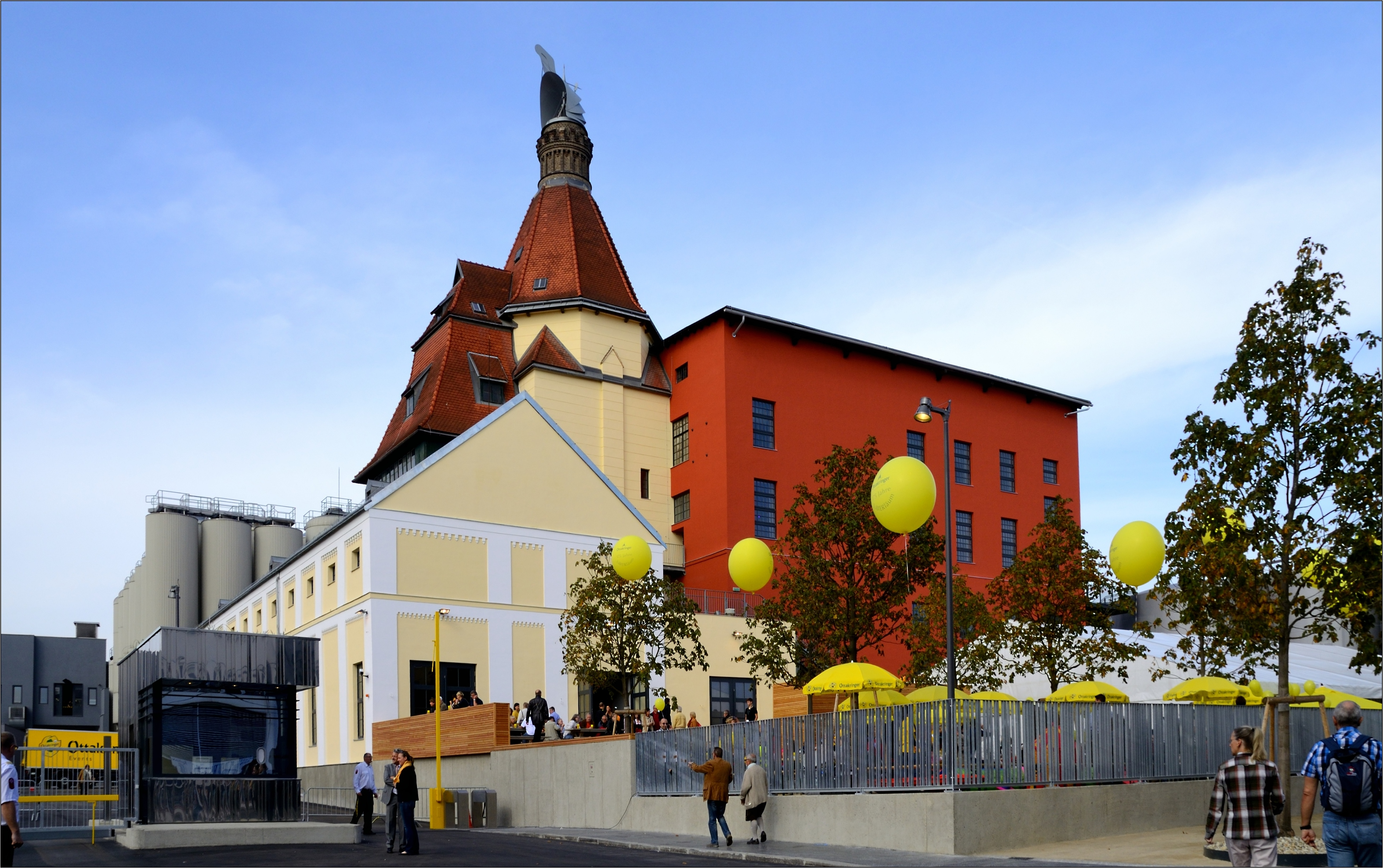 Blick auf die Ottakringer Brauerei (mit Zufahrt)